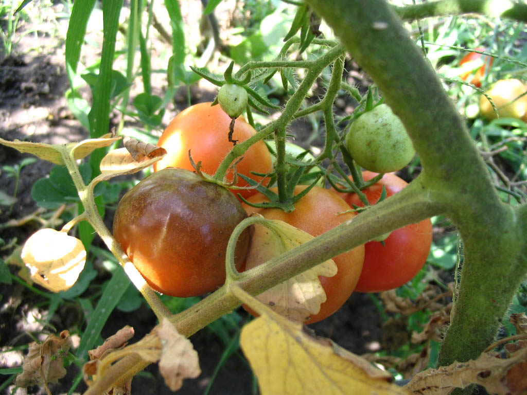 Braunfaeule frucht